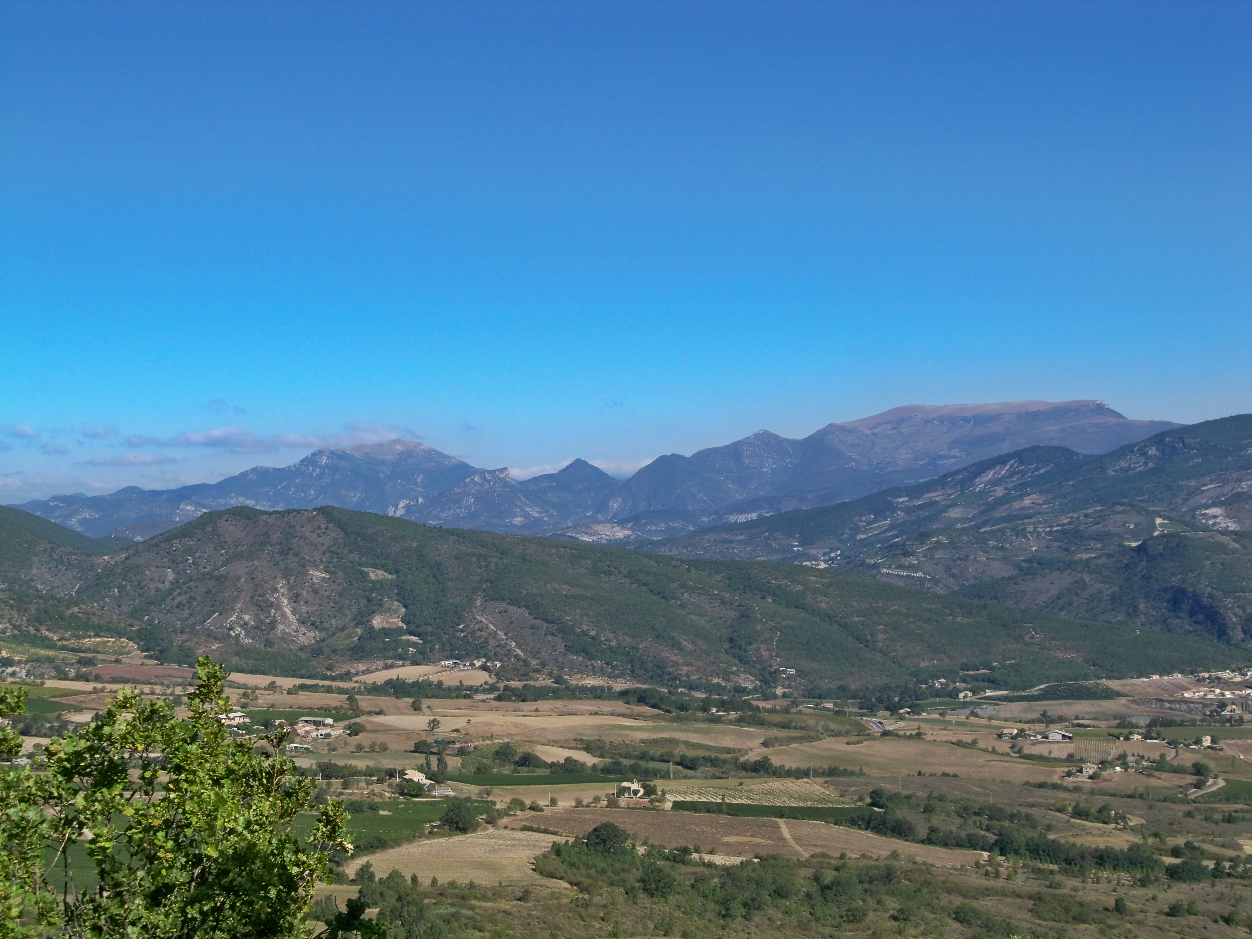 Vue du Col d'Ey vers la vallée d'Ennuye et Sainte Jalle. En dernier plan, les montagnes de Miélandre à gauche et d'Angèle à droite